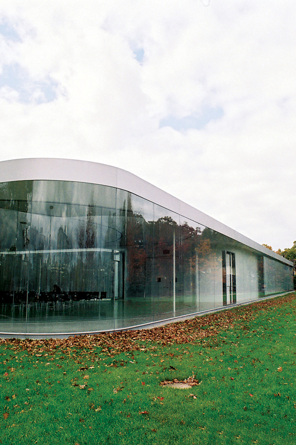 Foto exterior del Pabellón de Vidrio del museo de Arte de Toledo